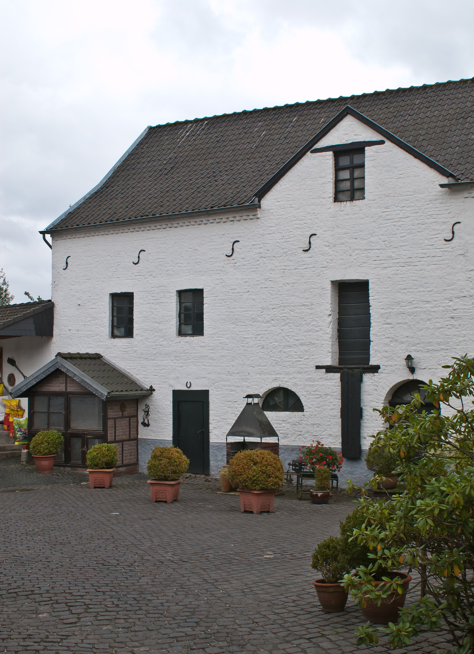 Blick auf den Hof der Mühle in Bergheim-Kenten